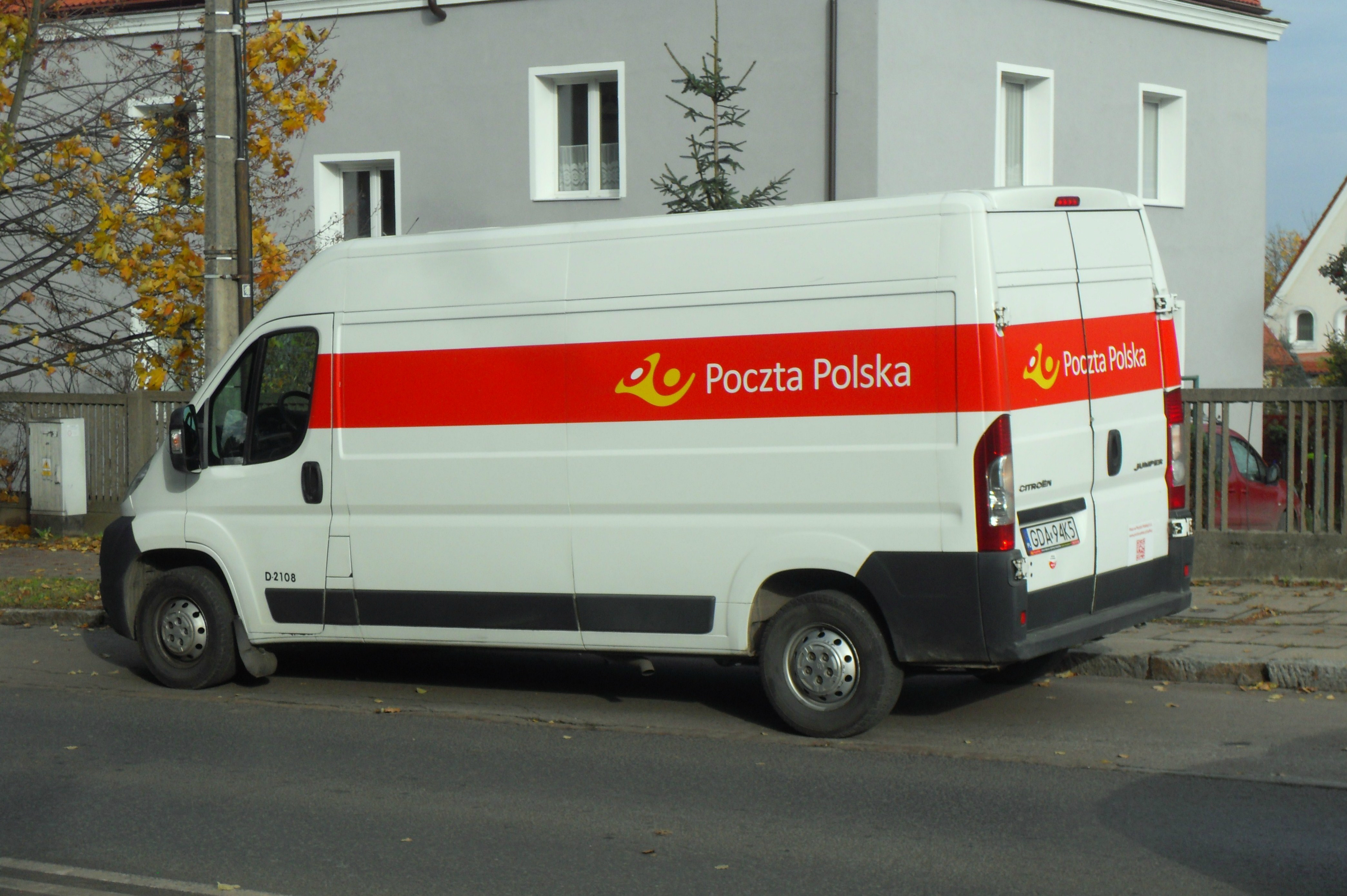 Gdańsk Oliwa, ul. Polanki. Citroën Jumper, Poczta Polska.